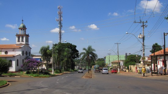 Avenida Alexandre Cazellato, centro de Betel, em Paulínia-SP